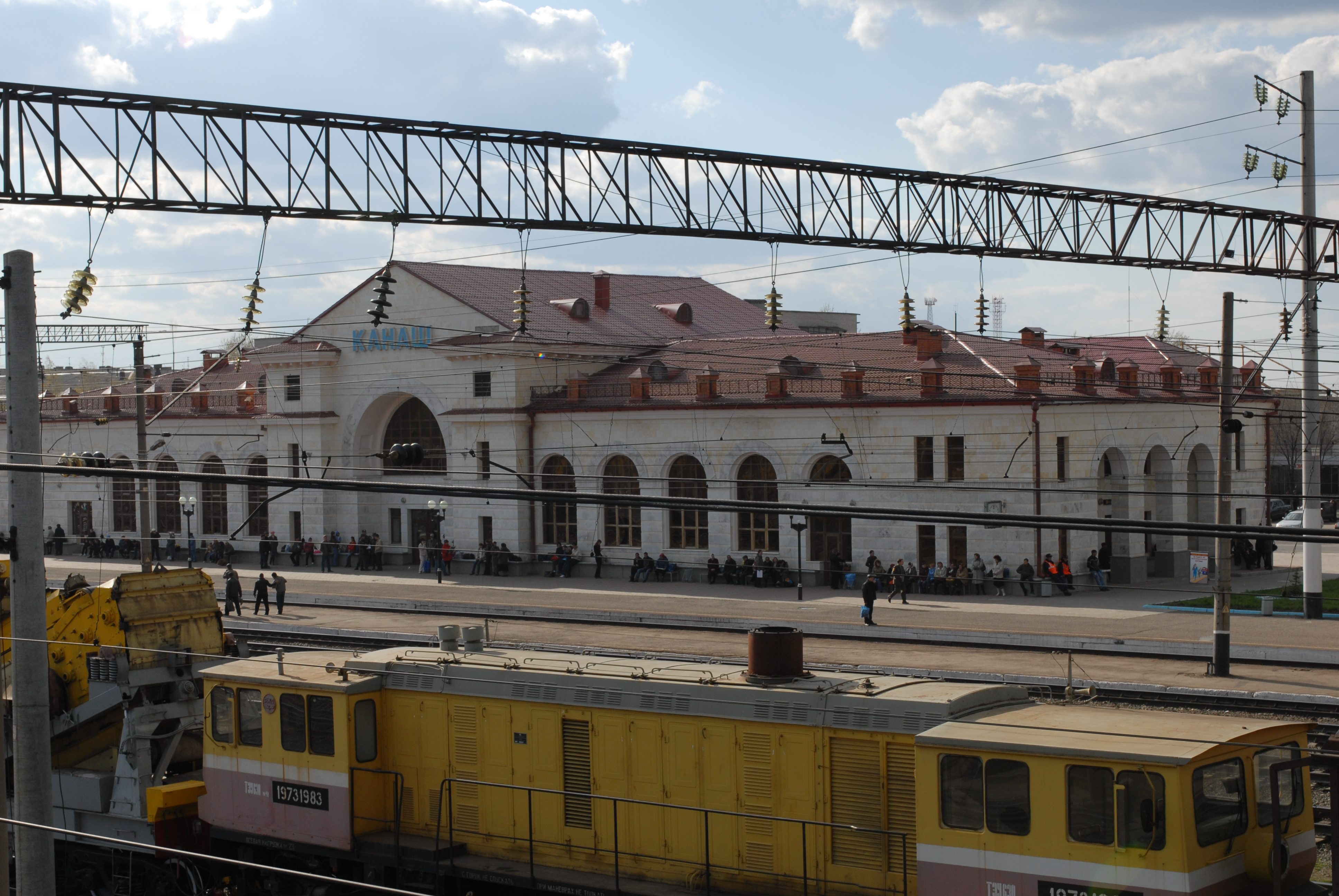 Чӑвашла: Канаш чугун çул вокзалě.